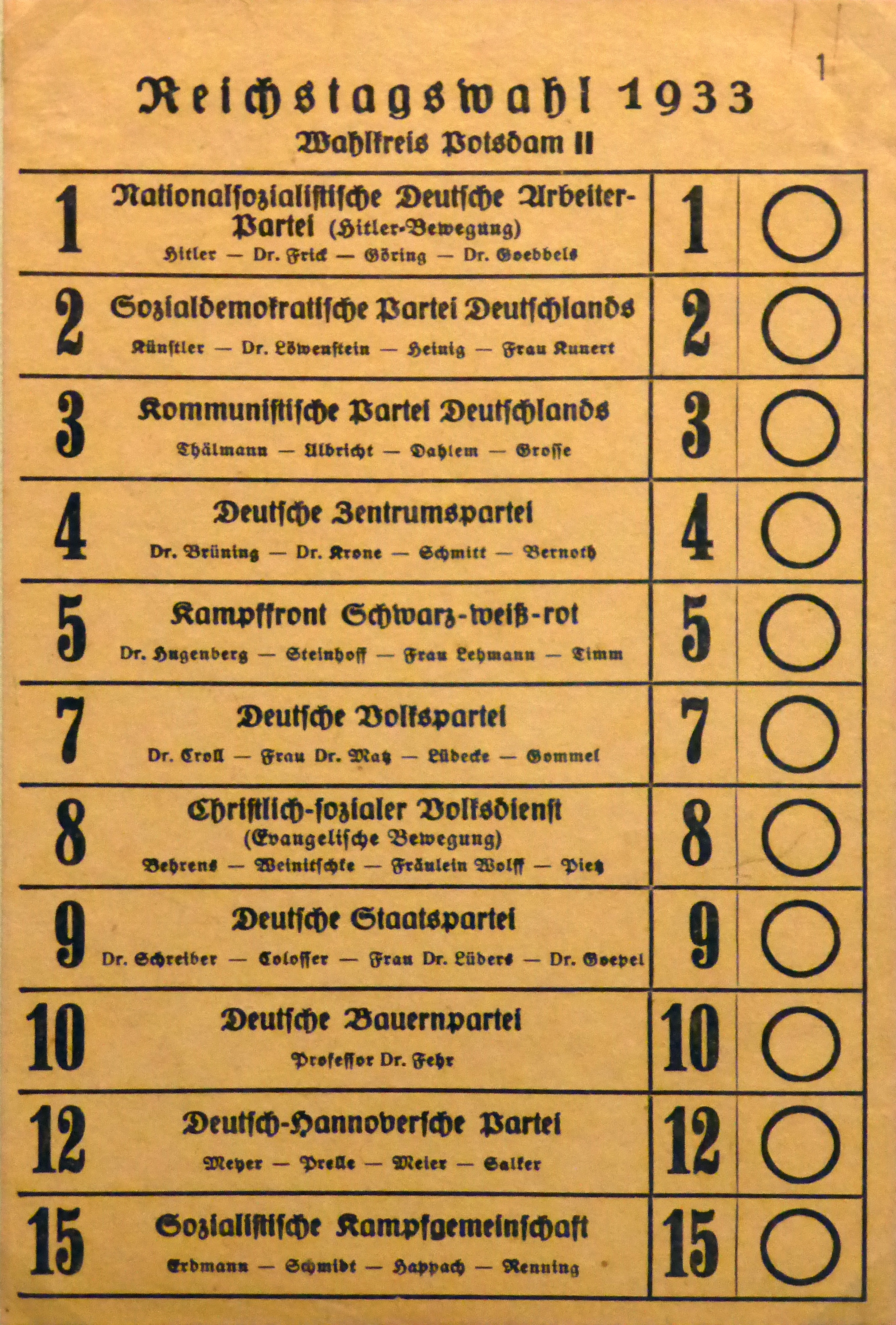 Stimmzettel zur Reichstagswahl März 1933 (Wahlkreis Potsdam II).